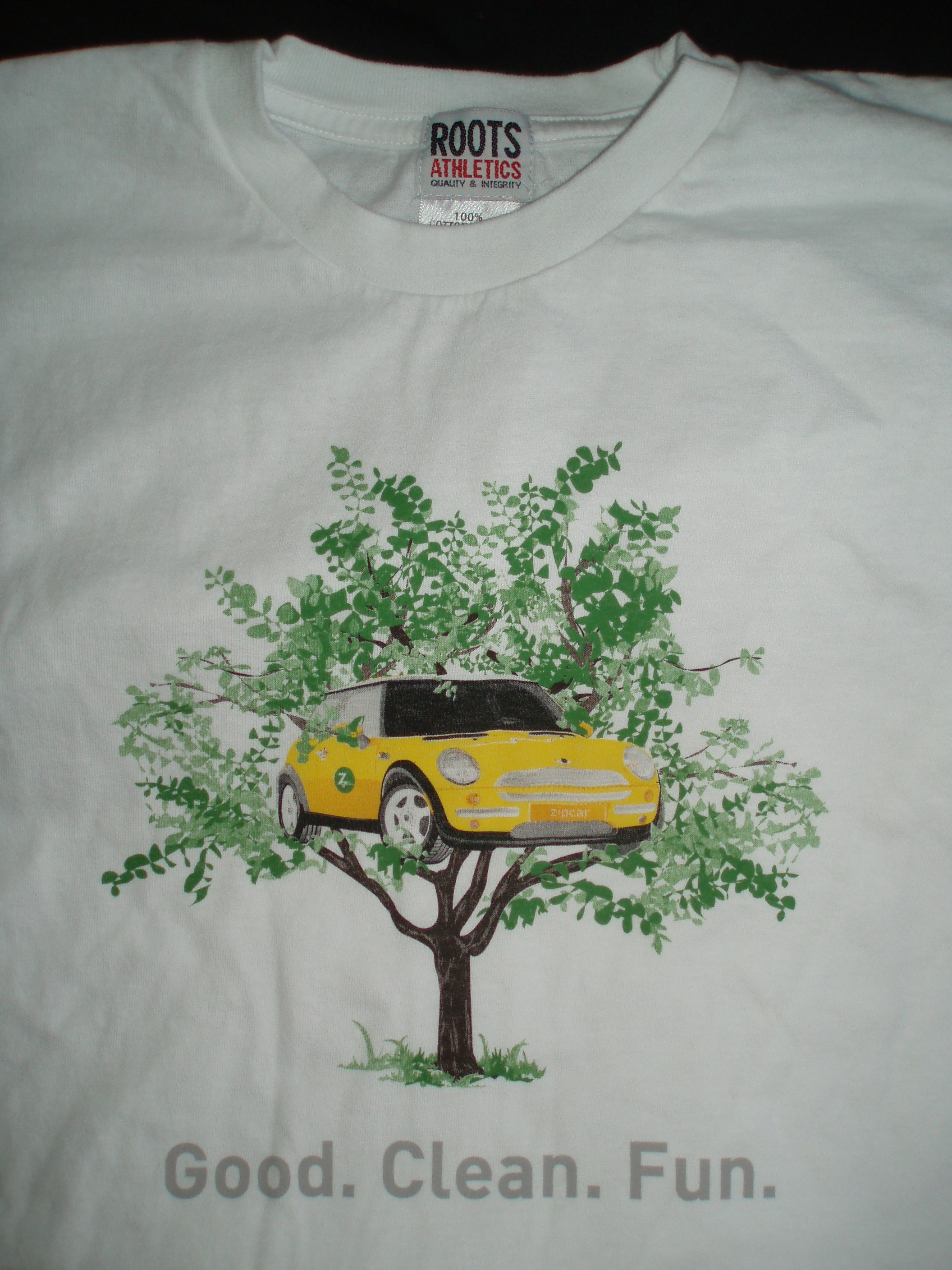 zipcar T-Shirt